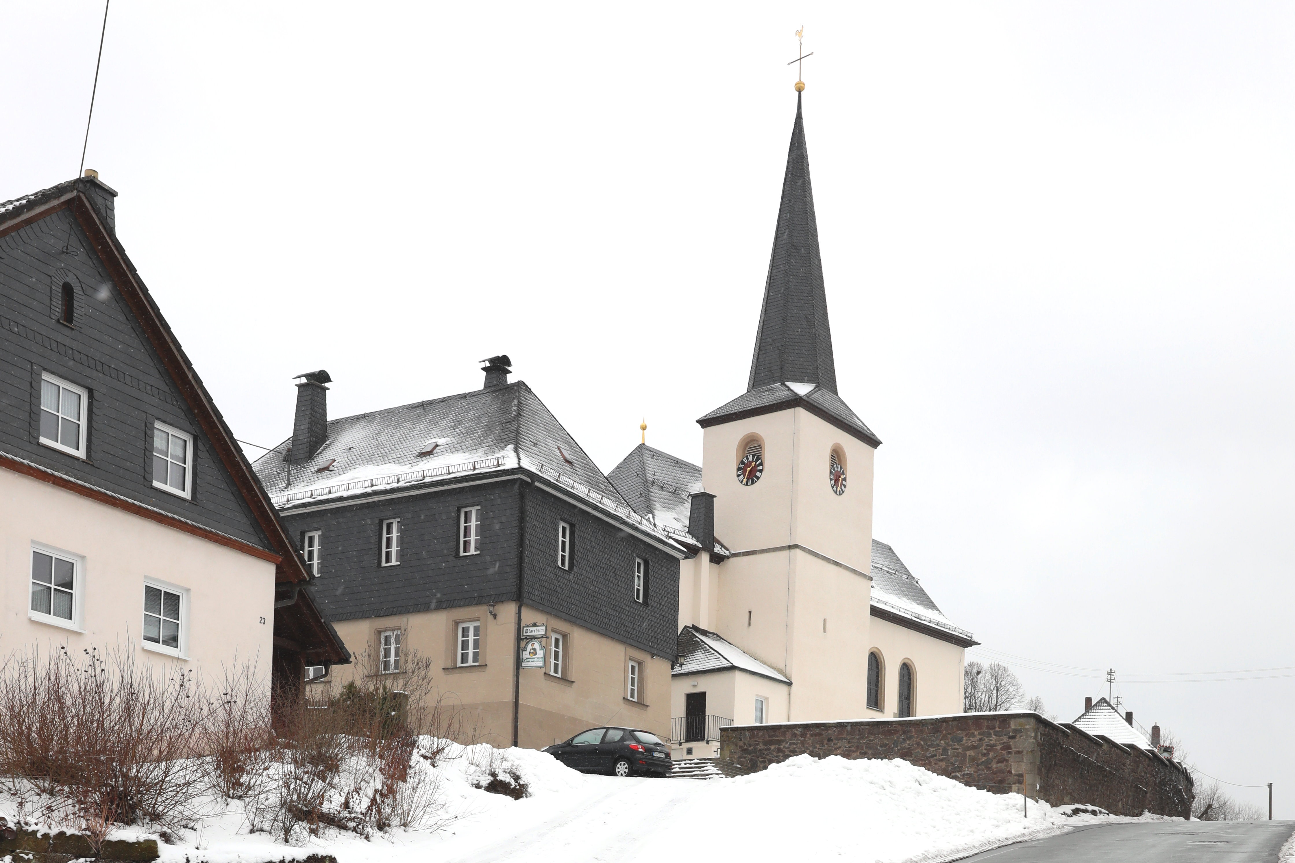 Katholische Kirche St. Johannes der Evangelist in Posseck